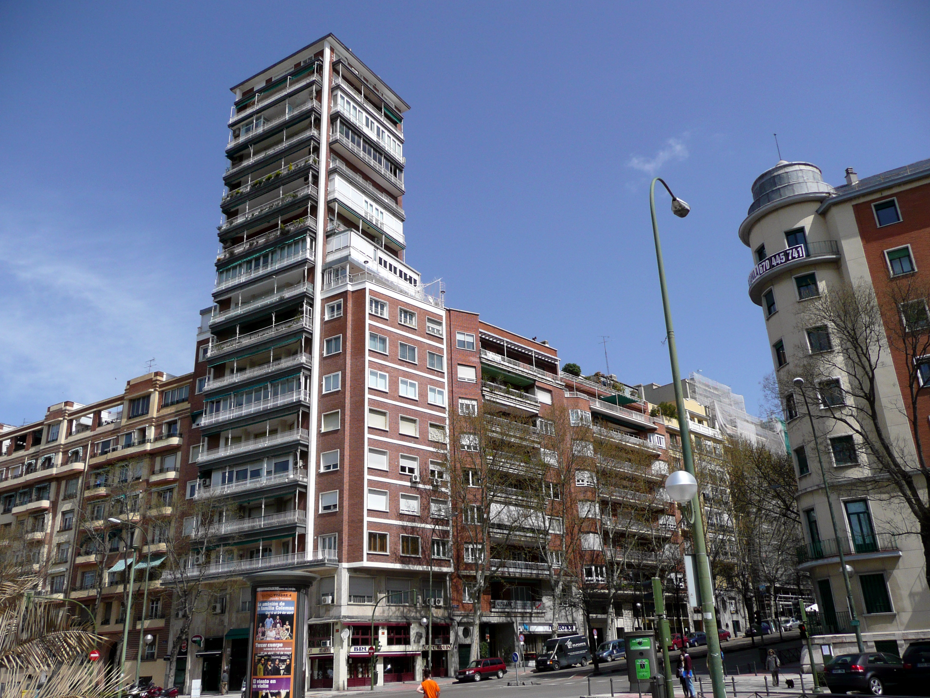 File:Edificio en la esquina de Pintor Rosales con Marqués de Urquijo